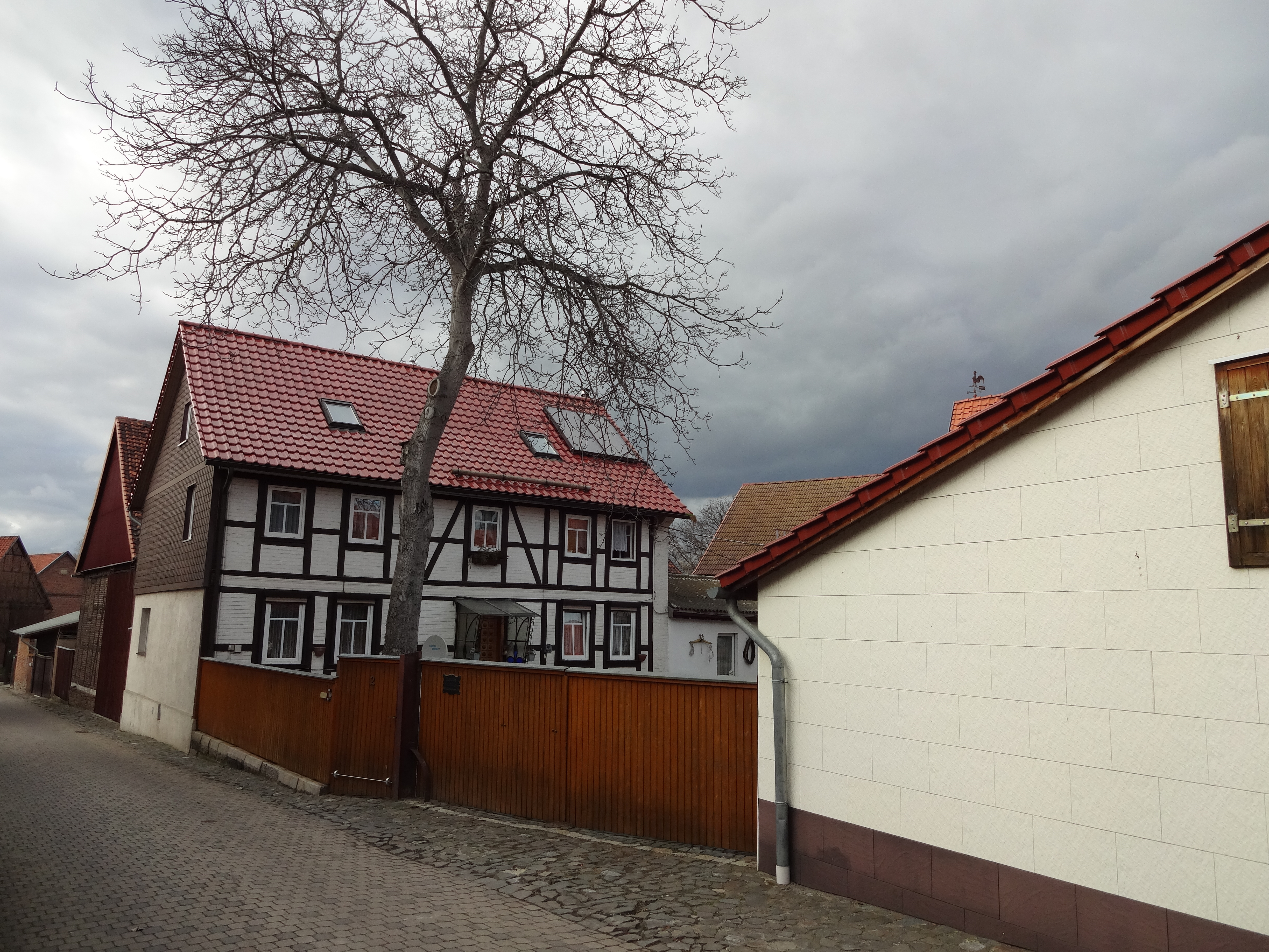 denkmalgeschütztes Wohnhaus in der Schäfereigasse 2 in Silstedt, Kulturdenkmal in Silstedt, Ortsteil von Wernigerode